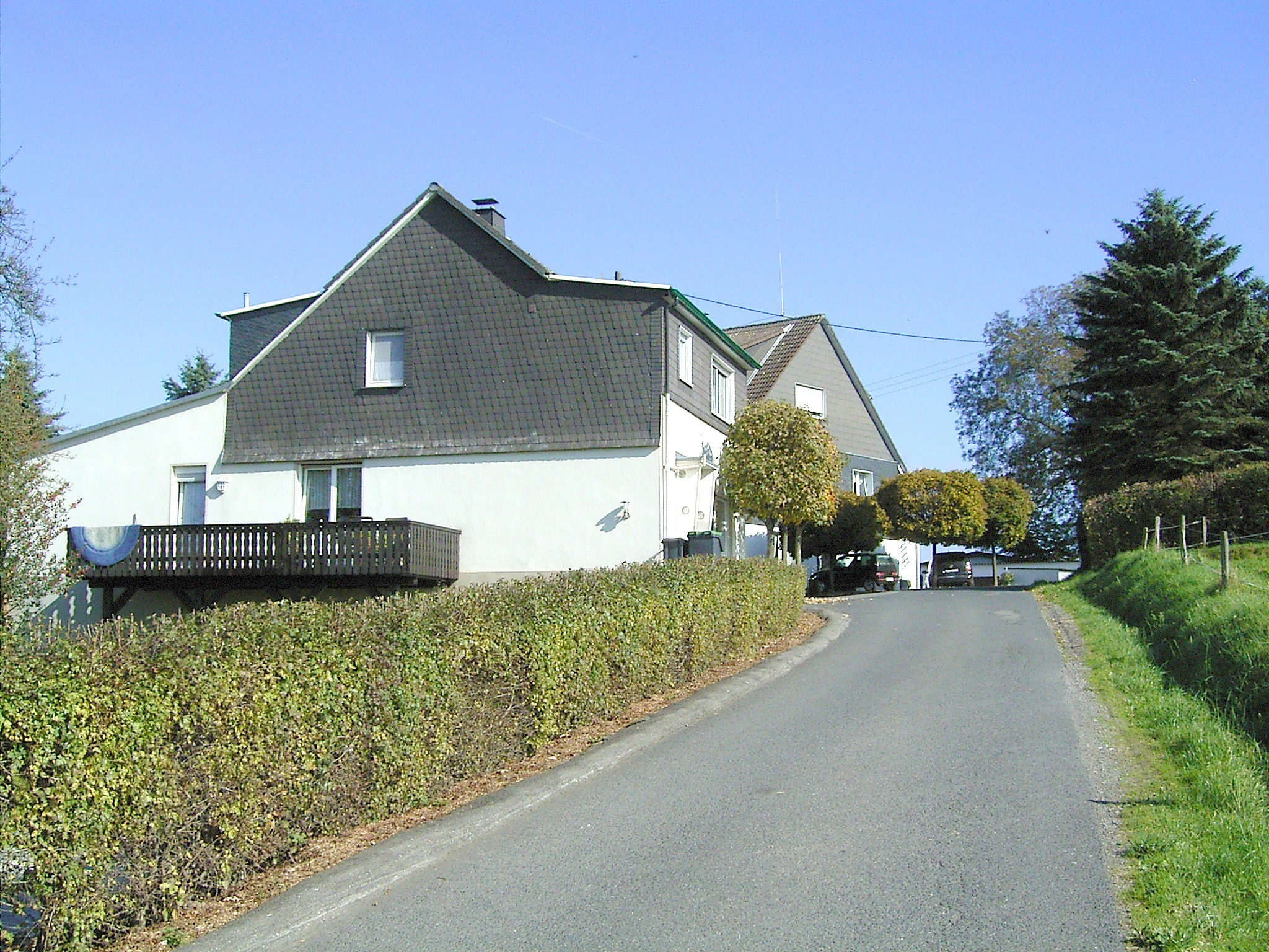 Radevormwald